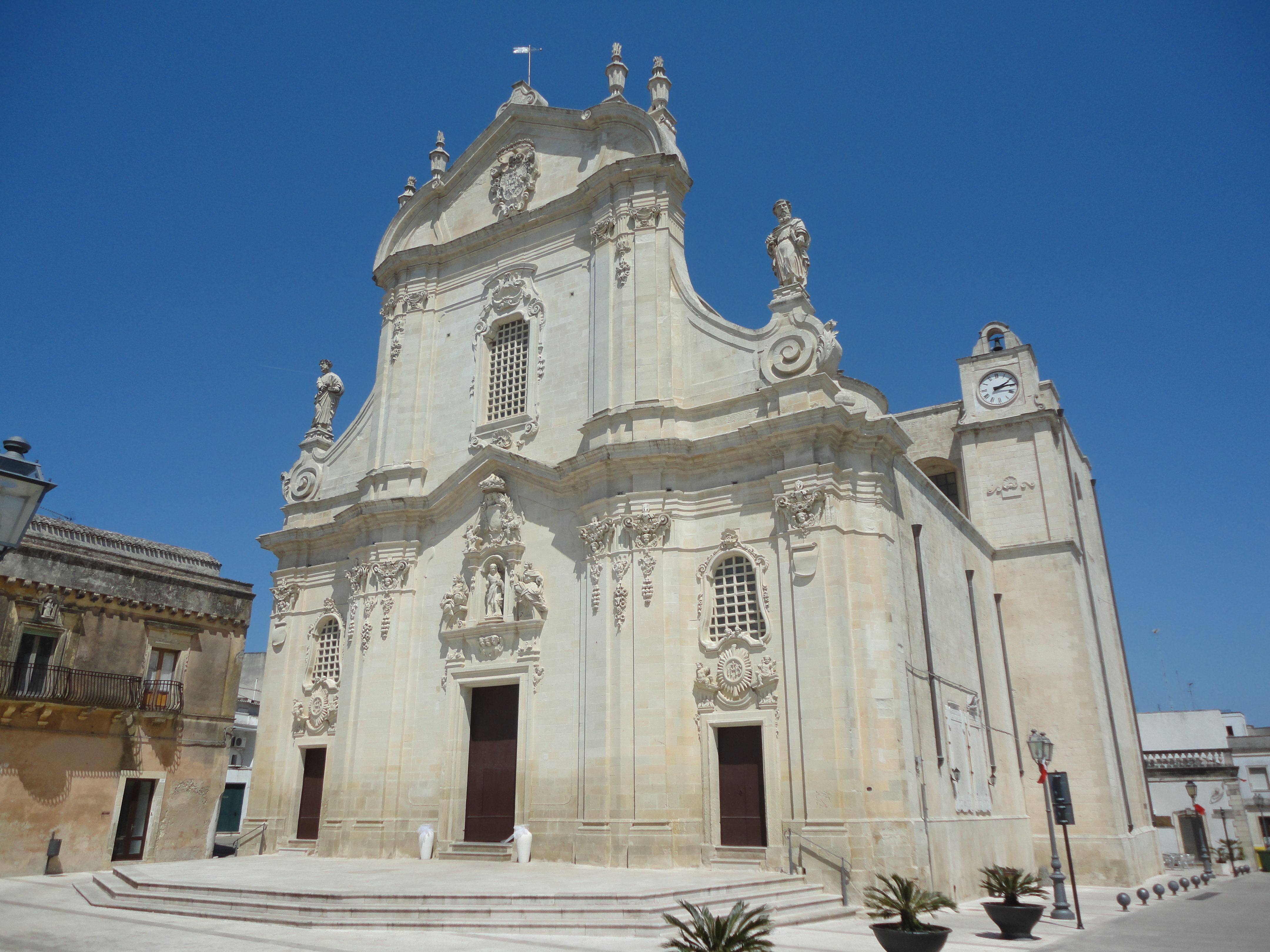 Chiesa Madre di Uggiano la Chiesa, Lecce